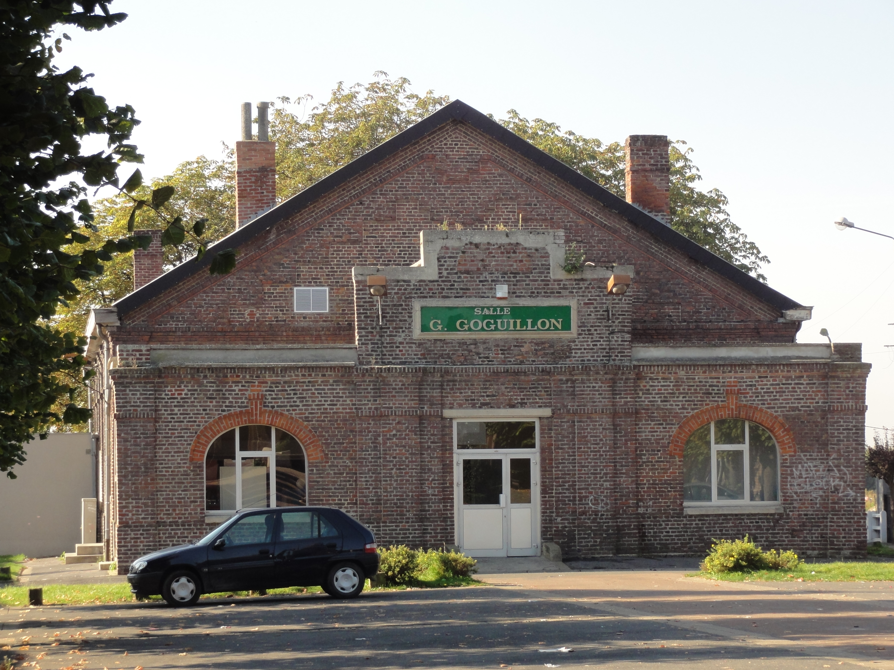 Salle des fêtes des cités de la Fosse Thiers de la Compagnie des mines d'Anzin à Bruay-sur-l'Escaut, Nord, Nord-Pas-de-Calais, France.